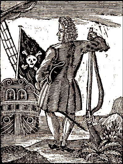 Piraten Stede Bonnet fra England, hengt for piratvirksomhet i 1718.